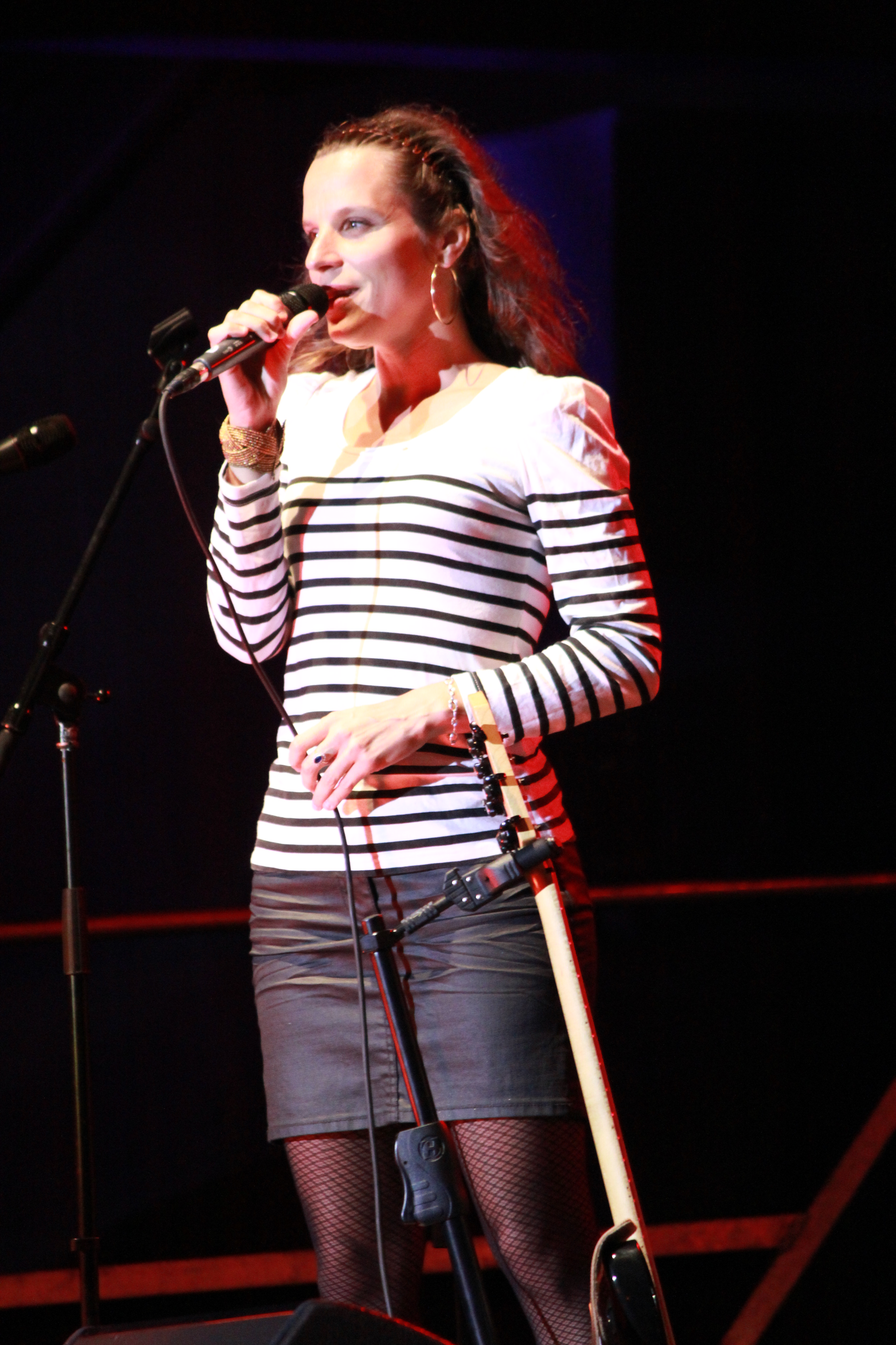 Clarisse Lavanant lors du concert inaugural de la tournée liée à la promotion de l'album Celebration, lors du Festival Interceltique de Lorient 2012.